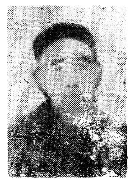 季龍圖季龍圖季龍圖